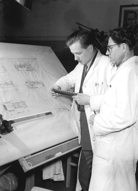 Ingenieure am Reissbrett Zentralbild Krueger 3.4.1957 Leipziger Frühjahrsmesse gab Perspektive zur Vergrösserung des Betriebs.Der Privatbetrieb Zeuke & Wegwerth KG aus Berlin- Köpenick, der elektrischen Spielzeug,z.B. Eisenbahnen und Dampfer baut, konnte bereits am ersten Messetag seine Produktion für das Jahr 1957 durch Verträge binden. Ausserdem wurden für das Jahr 1958 zahlreiche Perspektivverträge abgeschlossen. Herr Wegwerth, der kaufmännische Leiter des Betriebs, sagte dass sie bisher noch auf keiner Messe so große Abschlüsse tätigen konnten wie auf der dies jährigen Leipziger Frühjahrsmesse. Auf Grund der Perspektive, die diese Abschlüsse bieten, wird der Betrieb zur Zeit vergrössert, da ausserdem im III.Quartal die Produktion der TT-Bahnen (12 mm Spur) aufgenommen wird, für die bereits Auslandsinteressenten vorhanden sind. Die Firma exportiert bereits nach Finnland, Österreich, Dänemark und Polen. UBz: Chefkonstrukteur Stahmann (links) und Konstrukteur Schmidt besprechen eine Weiterentwicklung an der TT-Bahn (12 mm Spur)